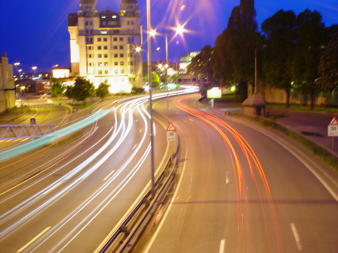 Oslo om natten med langt lukkertid.